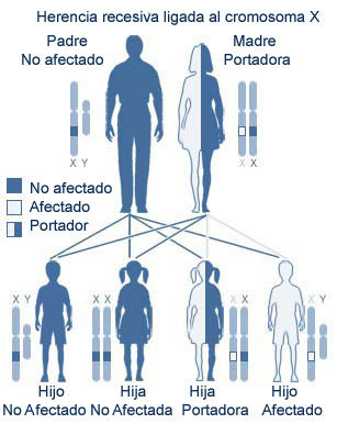 X-linked Recessive inheritance [1] From (traducido al español por mí)